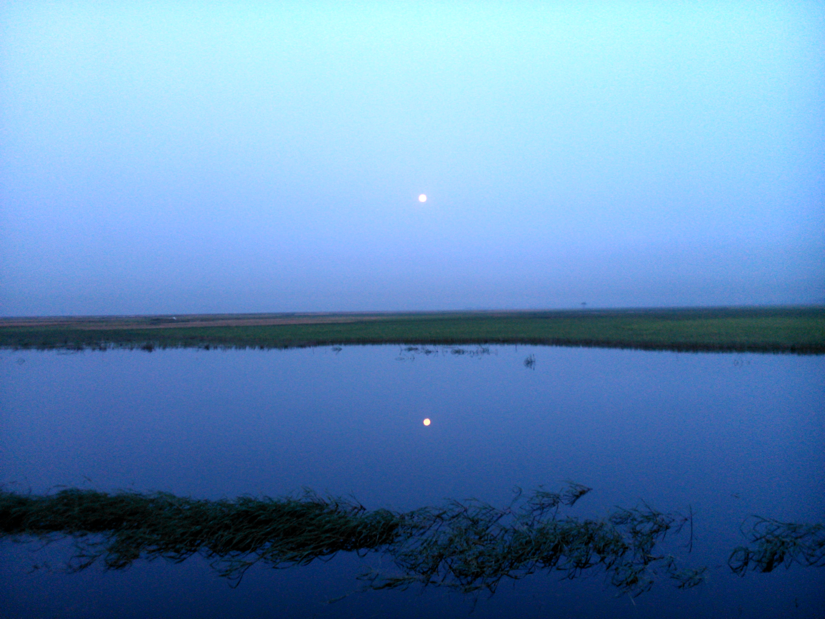 সরাইলের কালীকচ্ছ ইউনিয়নের ধরন্তির আকাশি বিল